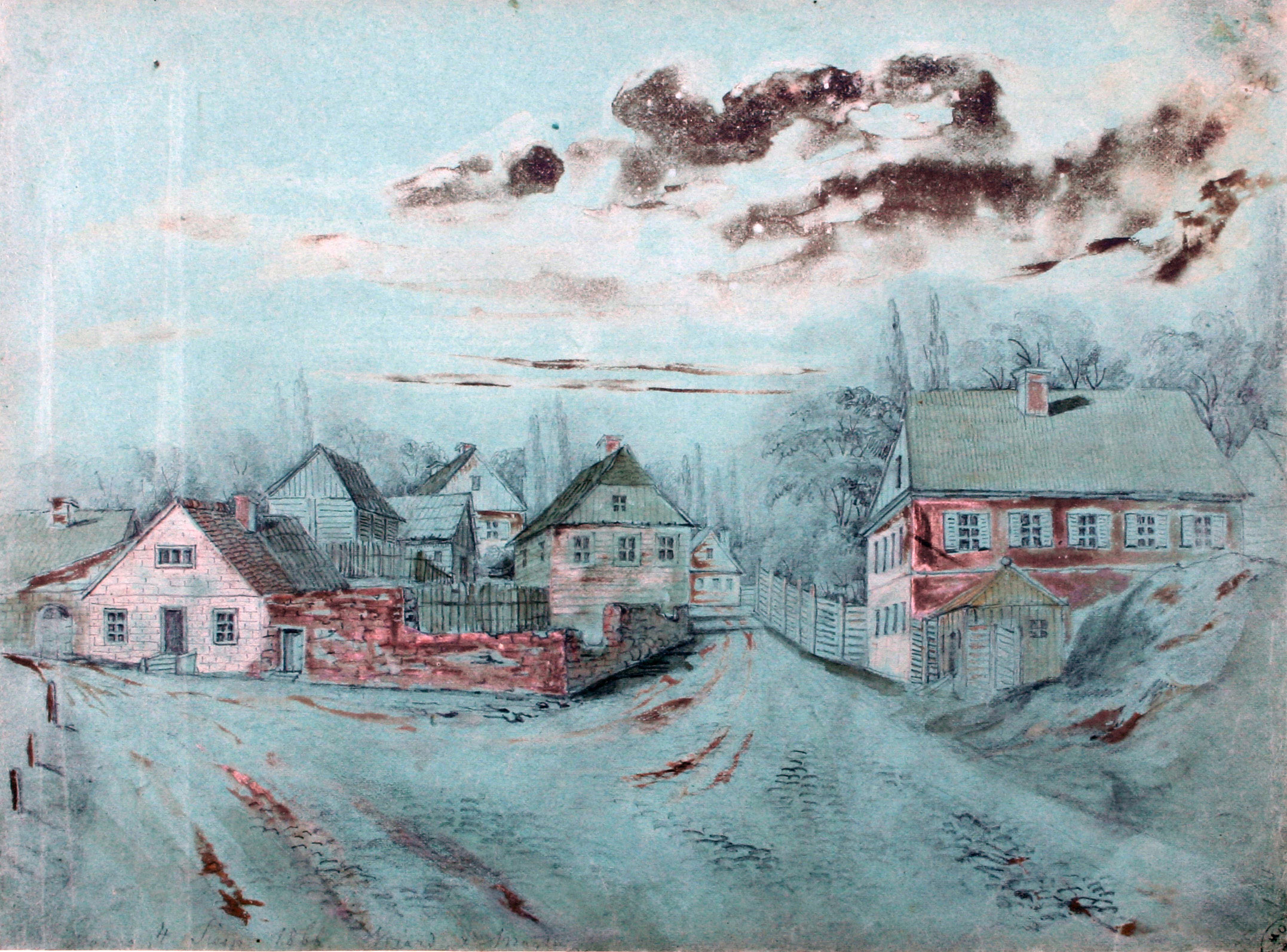 Беларуская (тарашкевіца): Горадня (Horadnia). Уезд у места